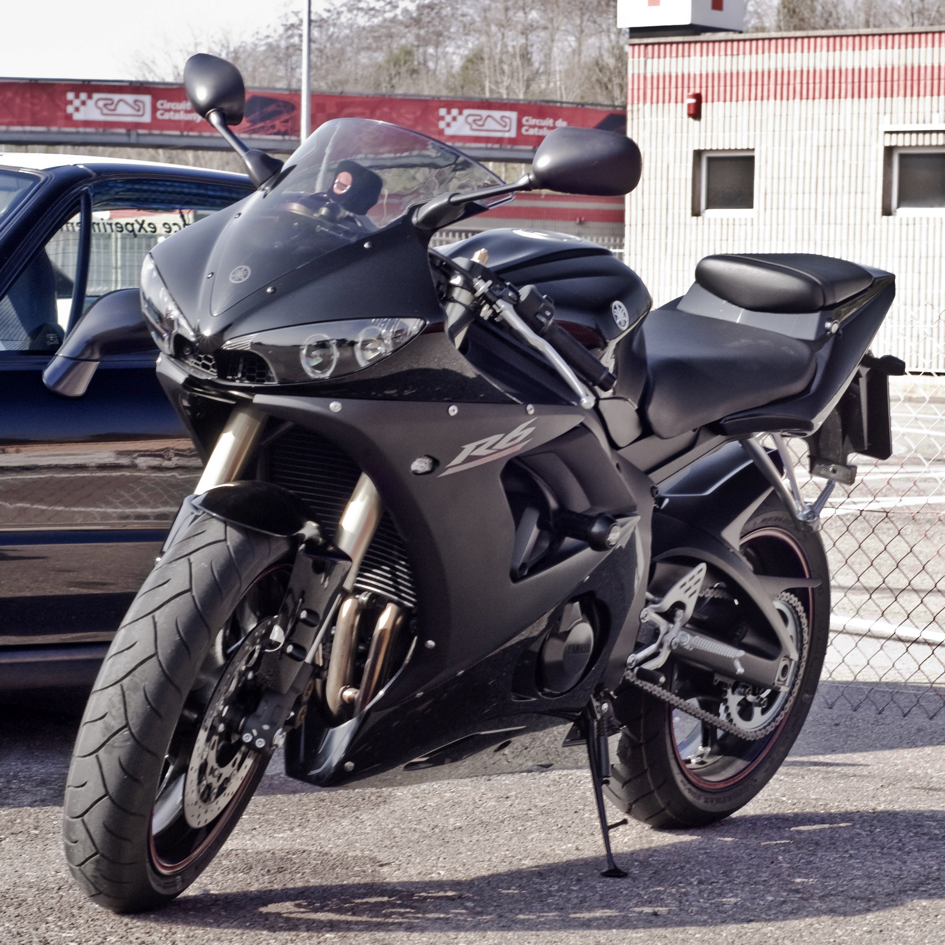 Yamaha YZF-R6R6